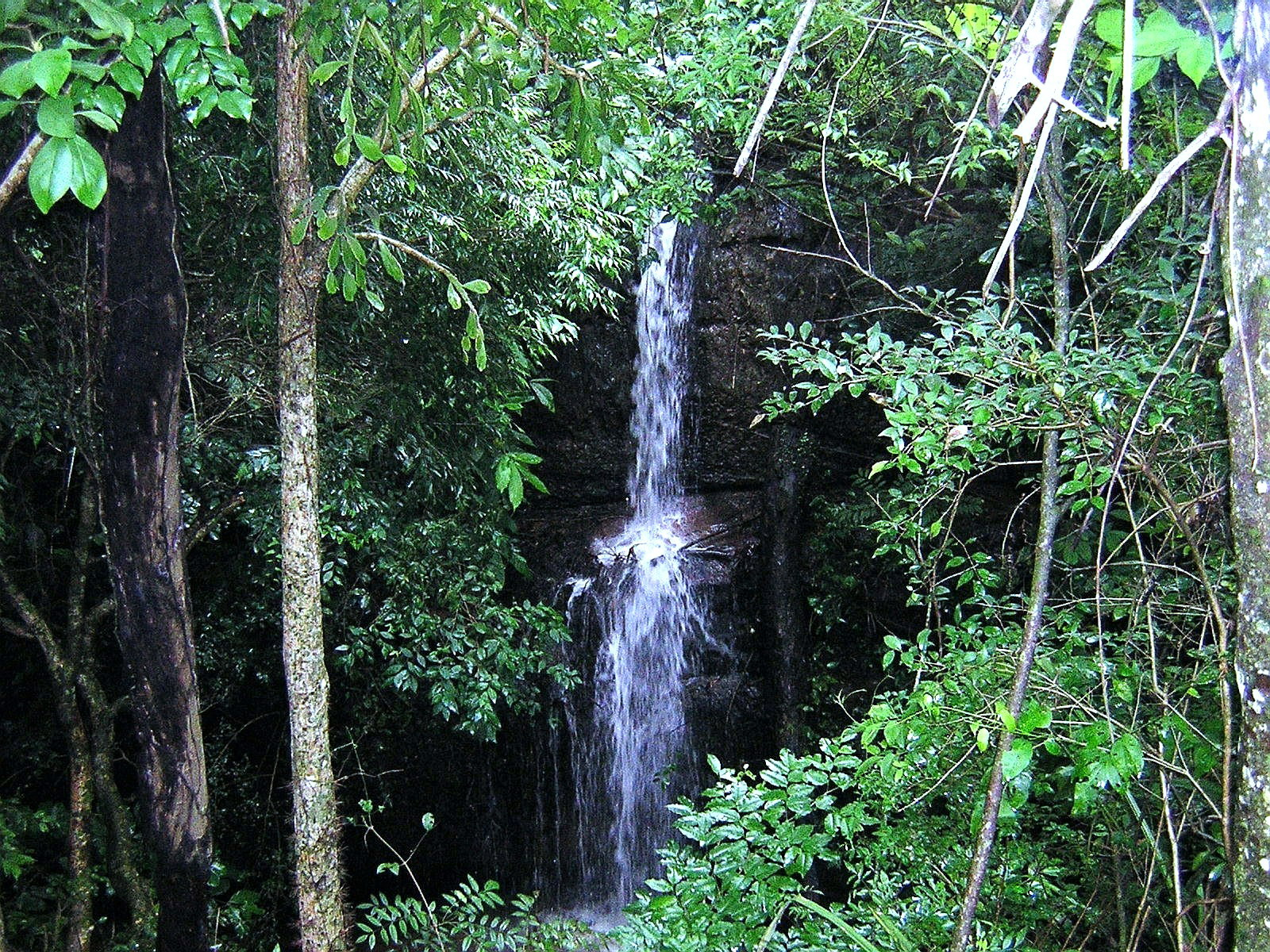 Salto Piroy.Reserva Mbatovi